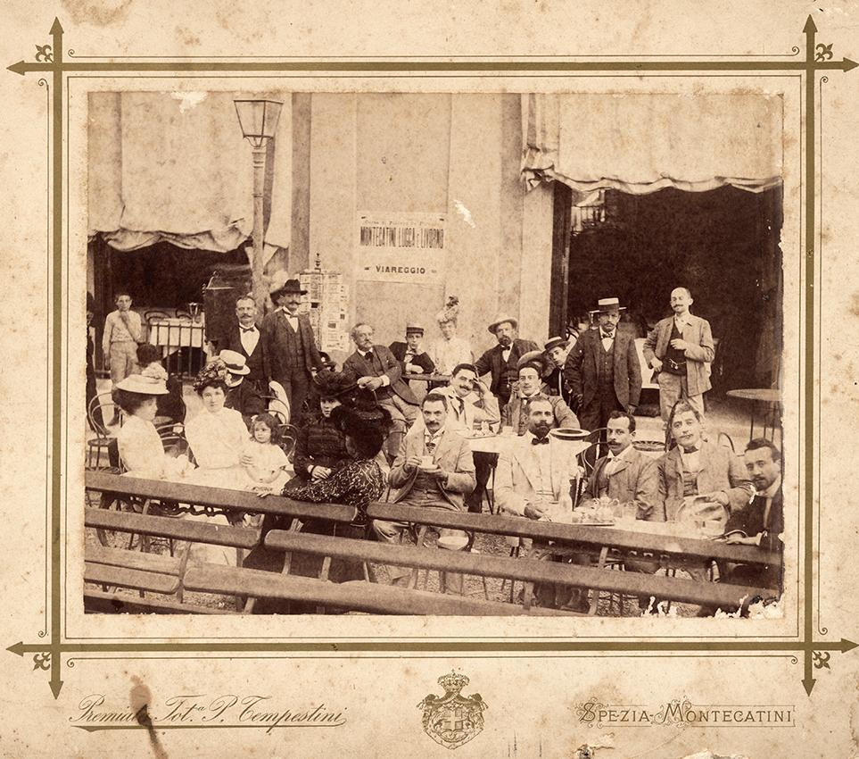 Terrasse de café à Montecatini photo P. Tempestini.